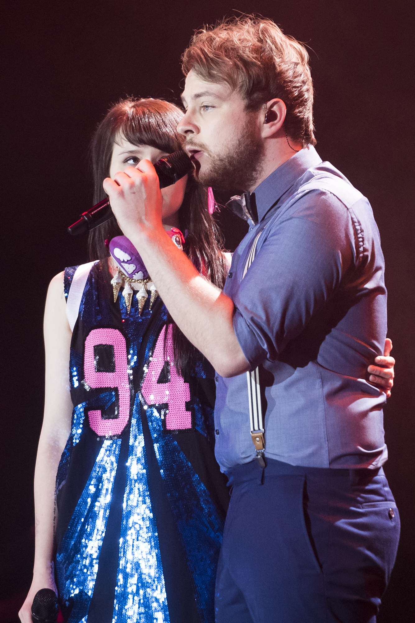 Ayke Witt, Zweitplatzierter der fünften Staffel von The Voice of Germany, zusammen mit Gewinnerin Jamie-Lee Kriewitz, in der Festhalle Frankfurt.